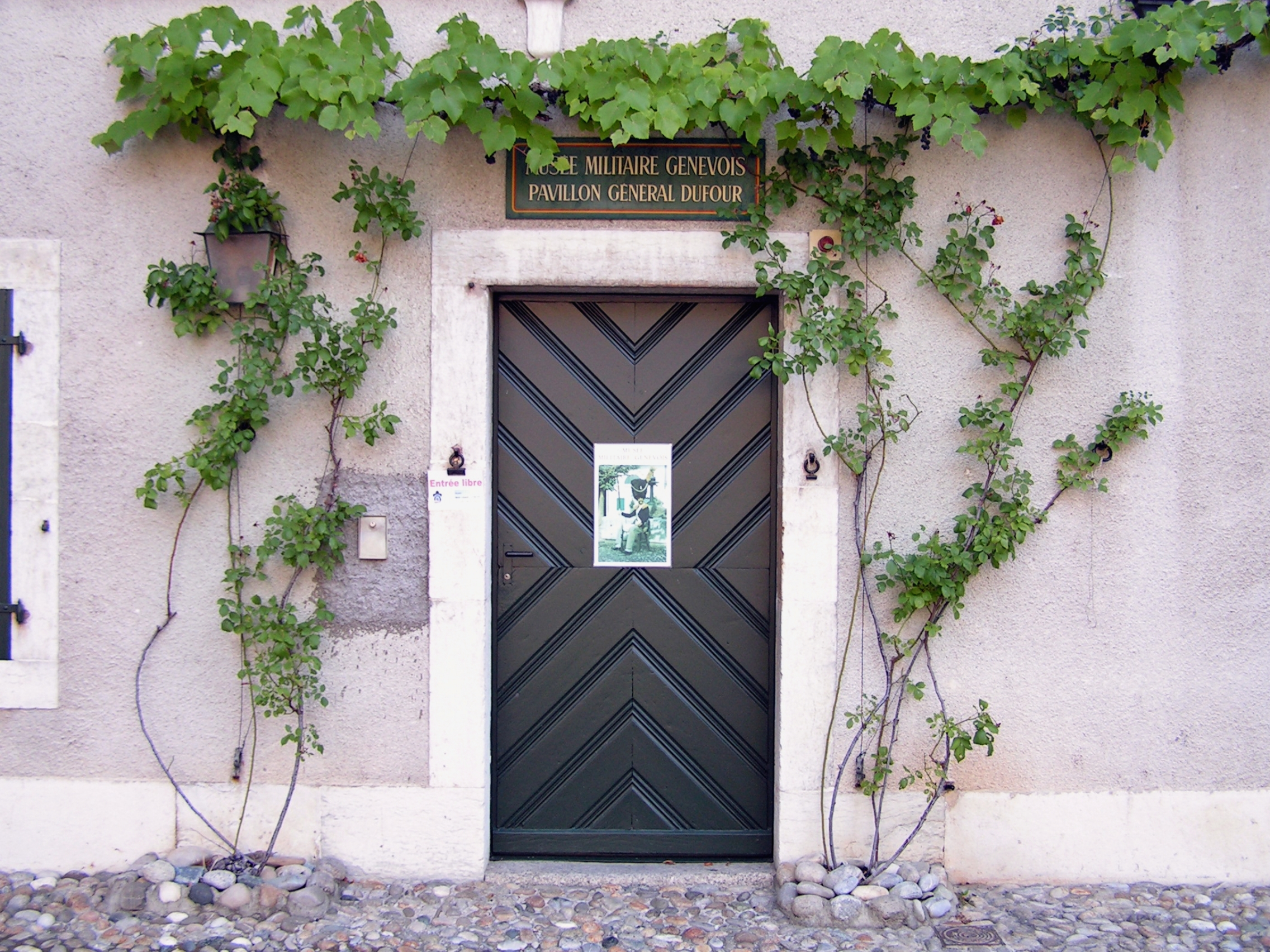 Chemin de l'Impératrice 18, Pregny-Chambésy. Musée militaire Genevois. Entrée du pavillon Général Dufour.